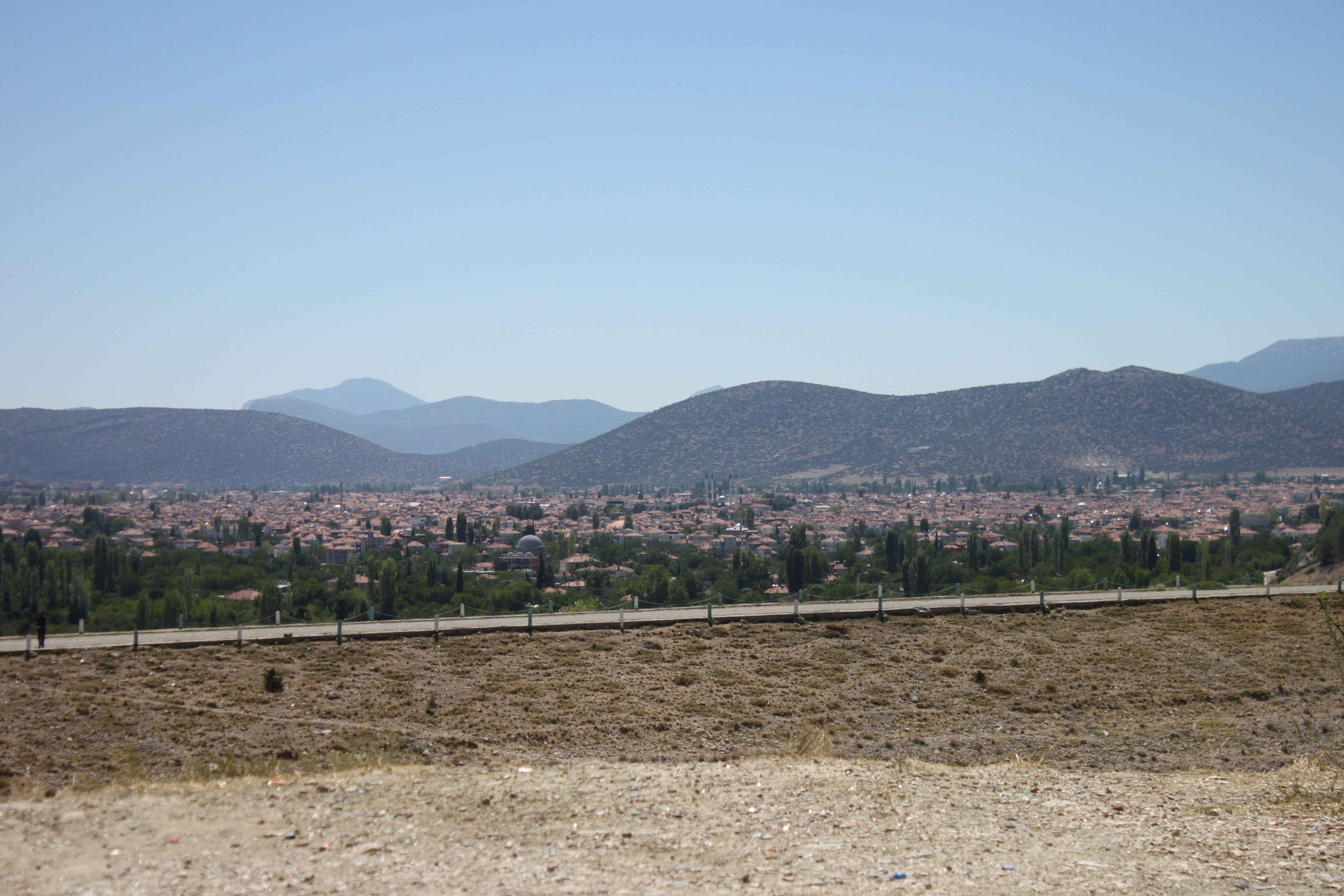 Der Damm des Korkuteli-Stausees im Westen der Stadt.